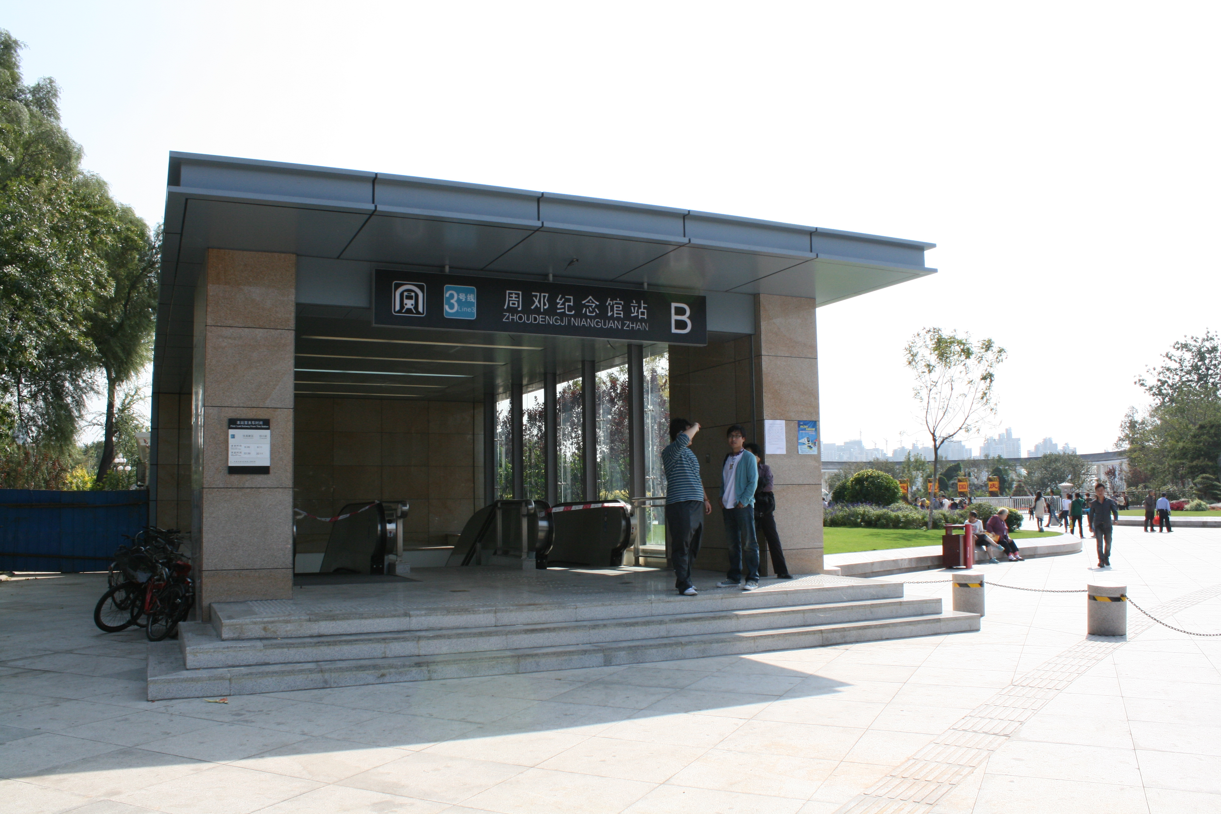 天津地鐵三號線周鄧紀念館站B出口 0001